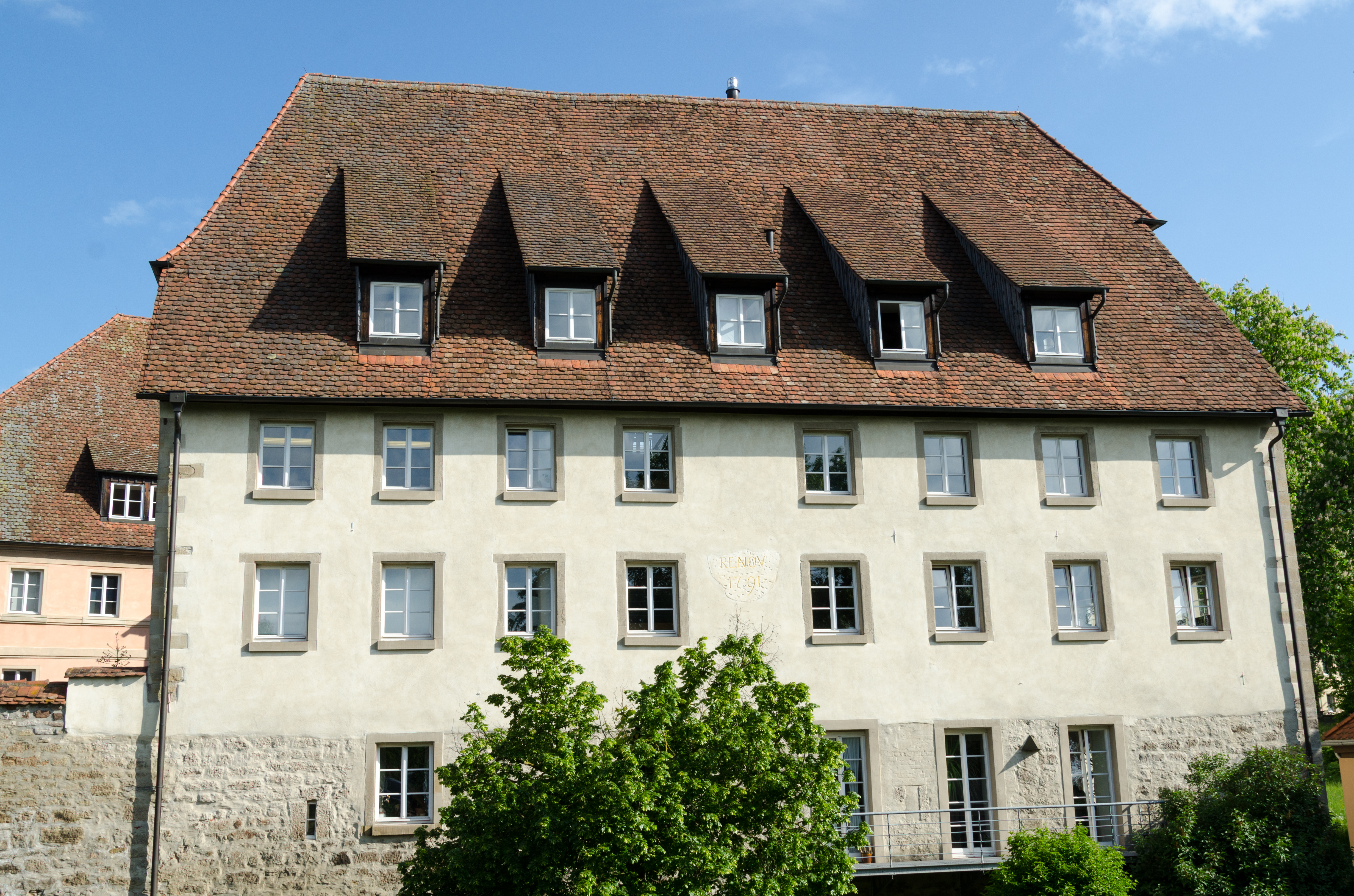 Crailsheim, ehem. Spital